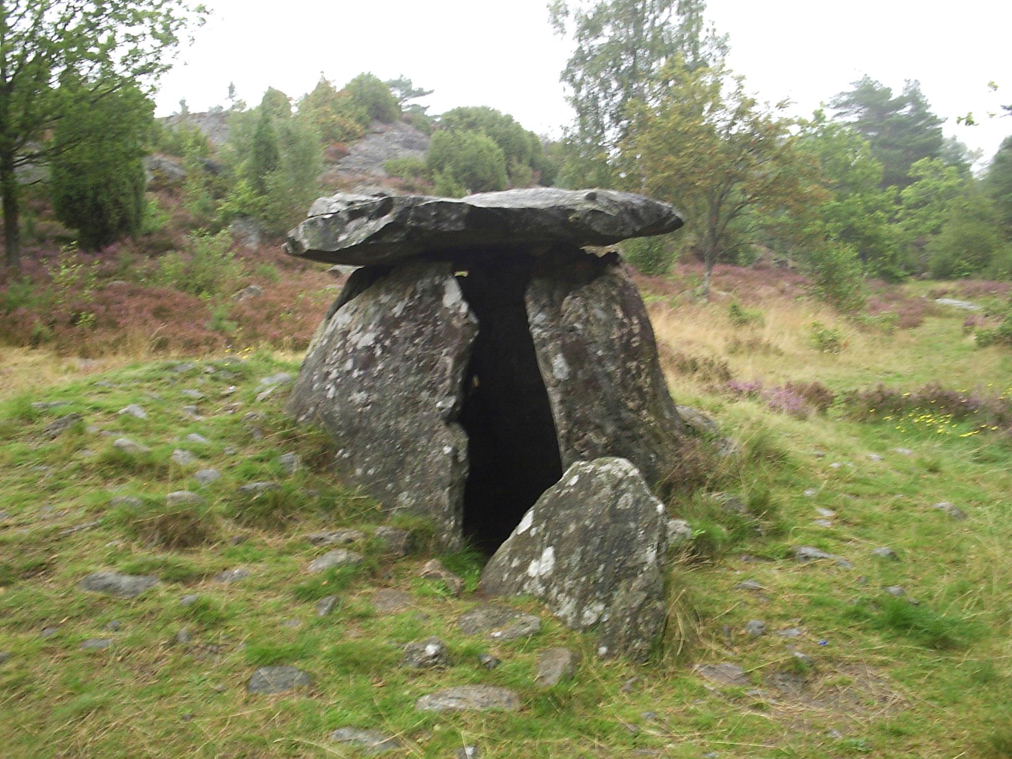 I Haga på Orust finns denna dös från neolitikum. Hagadösen är en av Sveriges mest kända dösar. Den undersöktes 1915, bl a hittades en skafthålsyxa och bärnstenspärlor. Fotograferad av Harri Blomberg, den 2 september 2005.